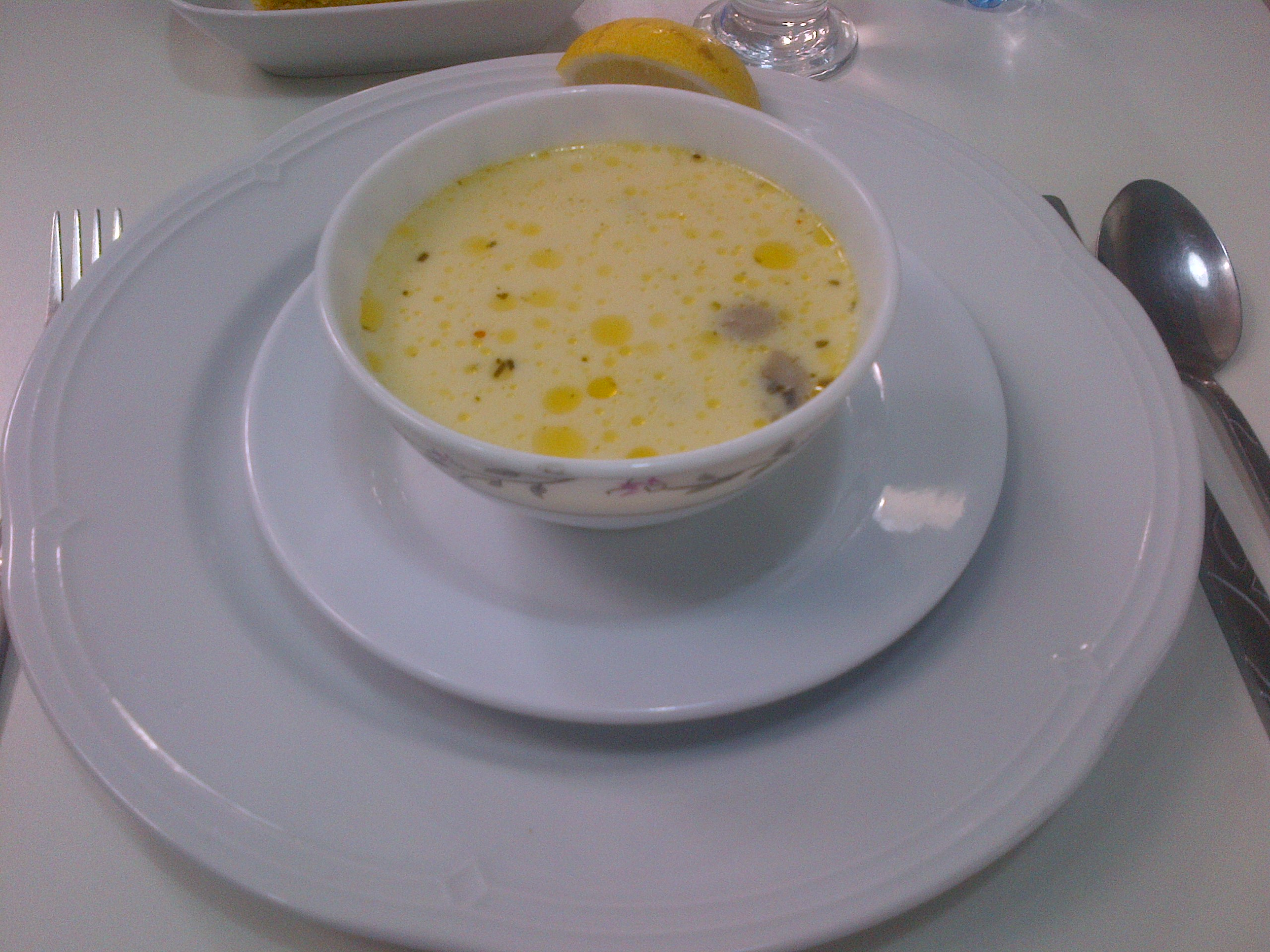 Sopa de pescado a la turca, con crema de cocinar y verduras, un sabor muy suave.